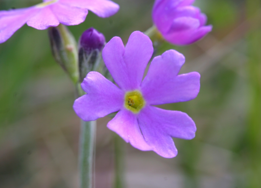 Primula_farinosa (Primula farinosa) Località: Le Laste, Limana (BL), 661 m s.l.m.